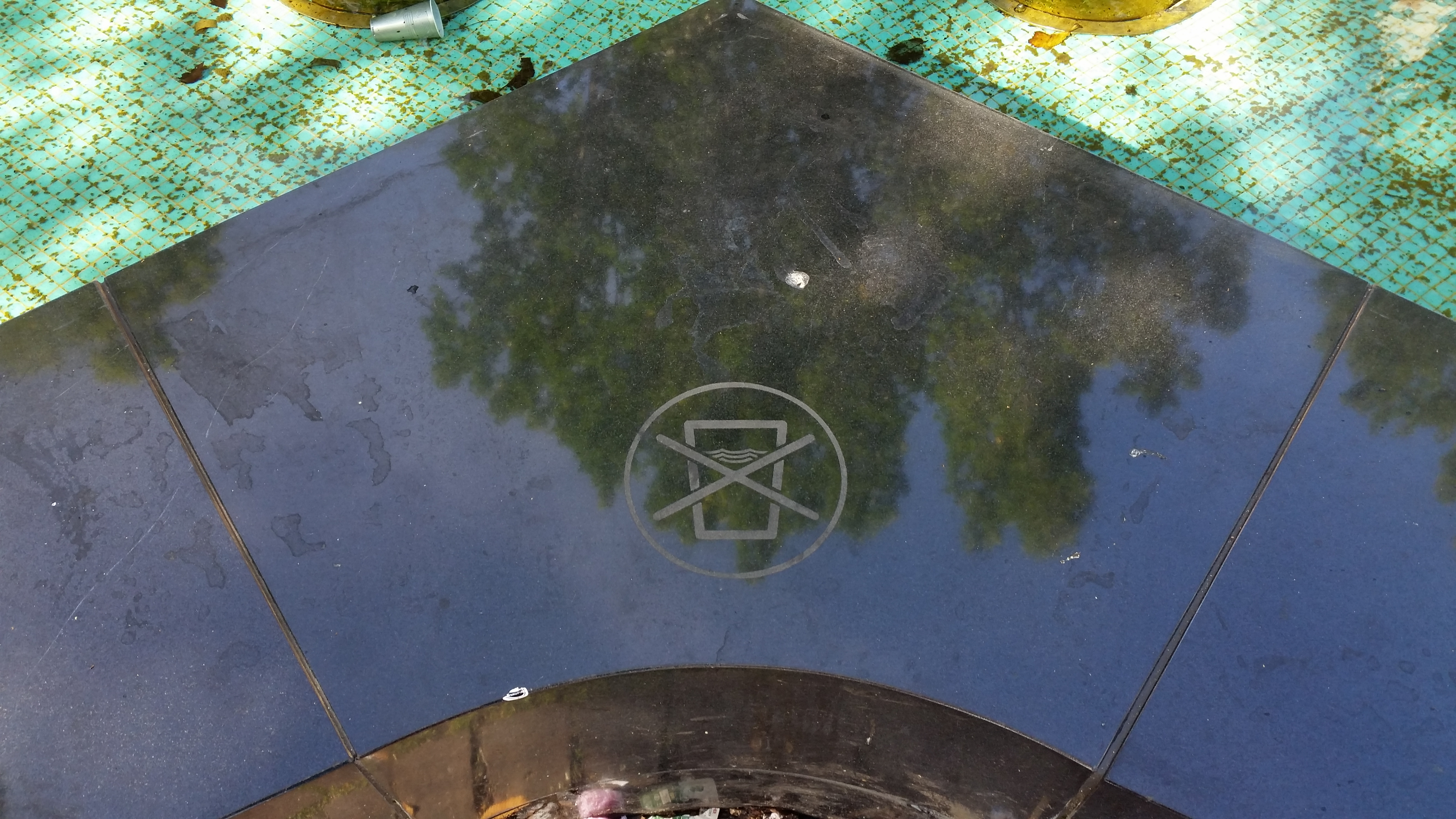 Teken "Geen drinkwater" (No drinking water) op Fountain Droogbak